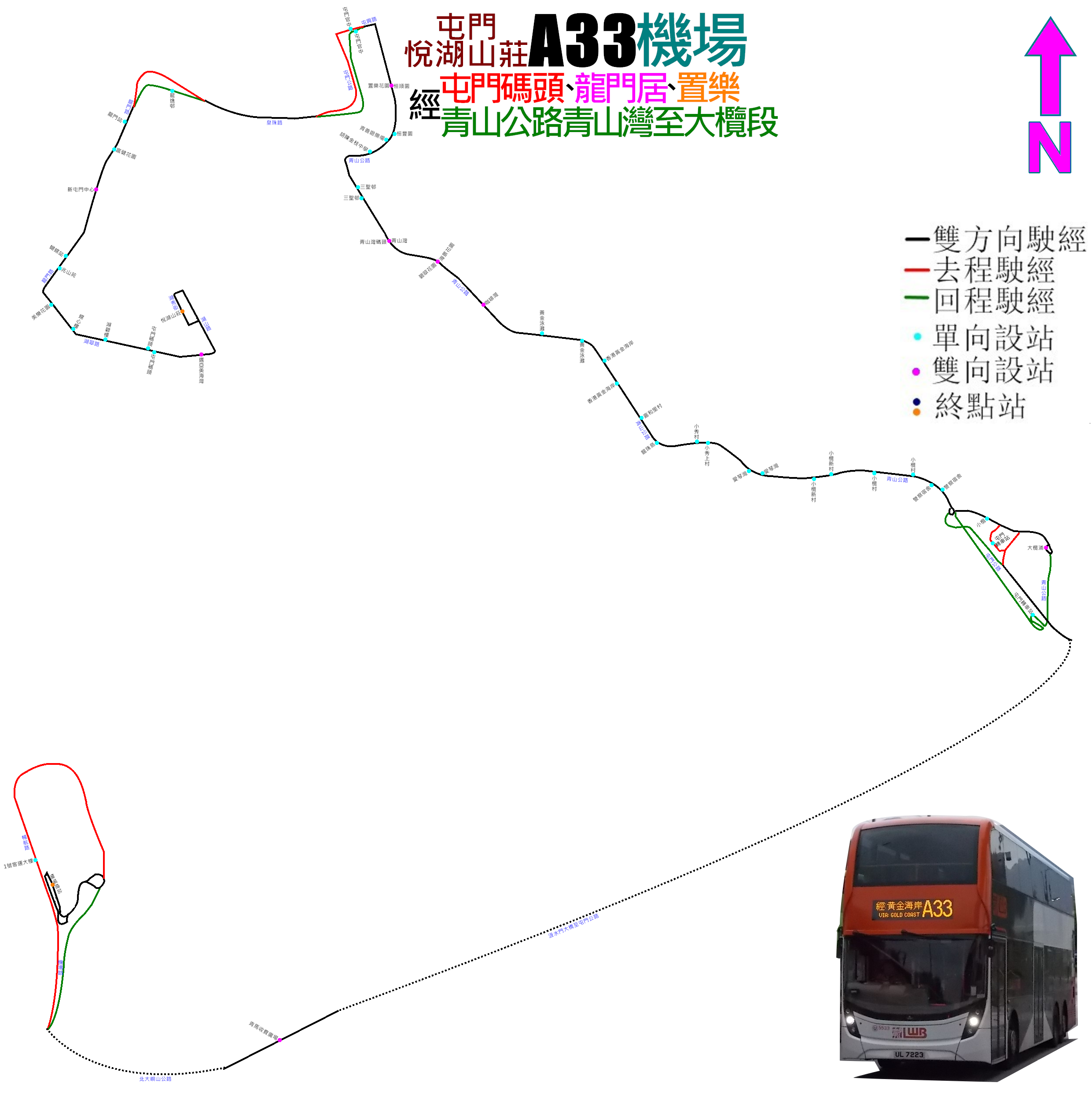 龍運巴士A33線的走線圖